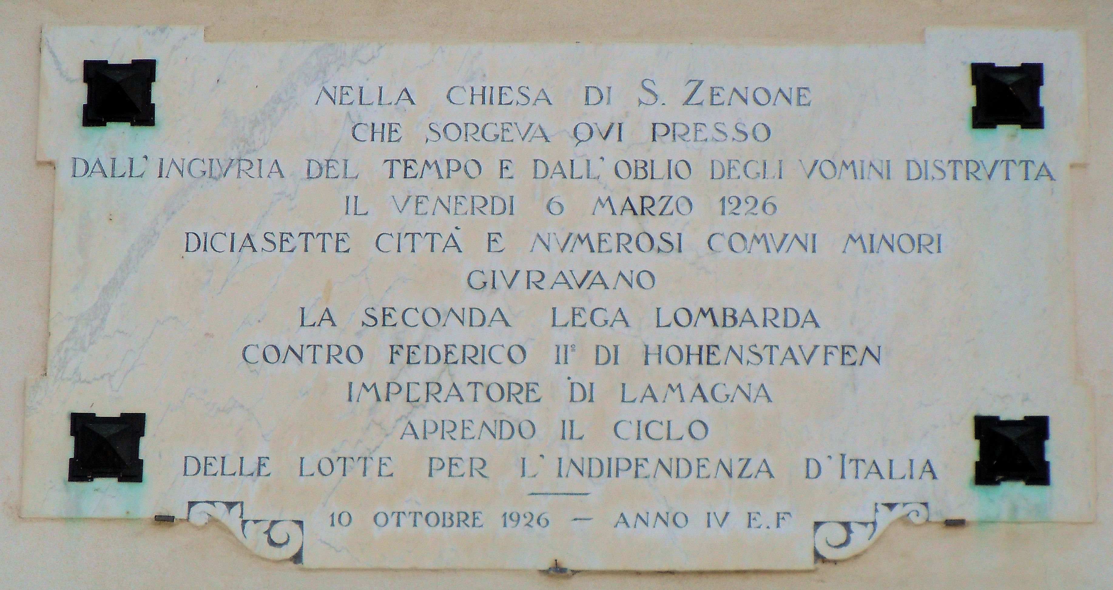 Mosio, lapide posta sulla chiesa parrocchiale a ricordo della seconda Lega Lombarda.